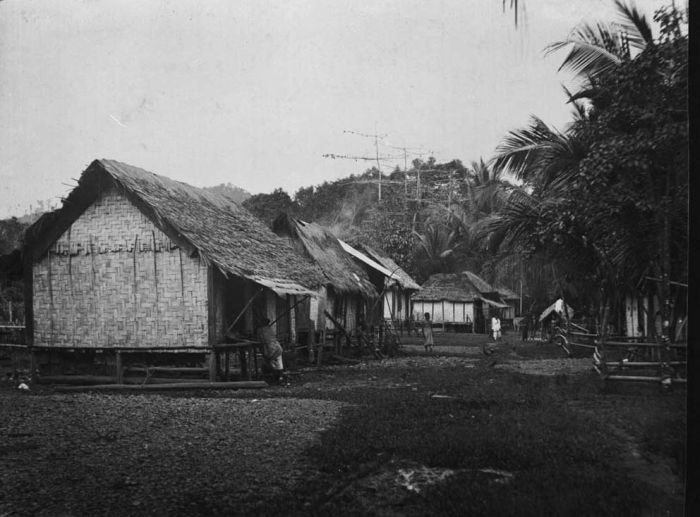 Foto. Kampong met rieten paalwoningen in Sangkoenoer